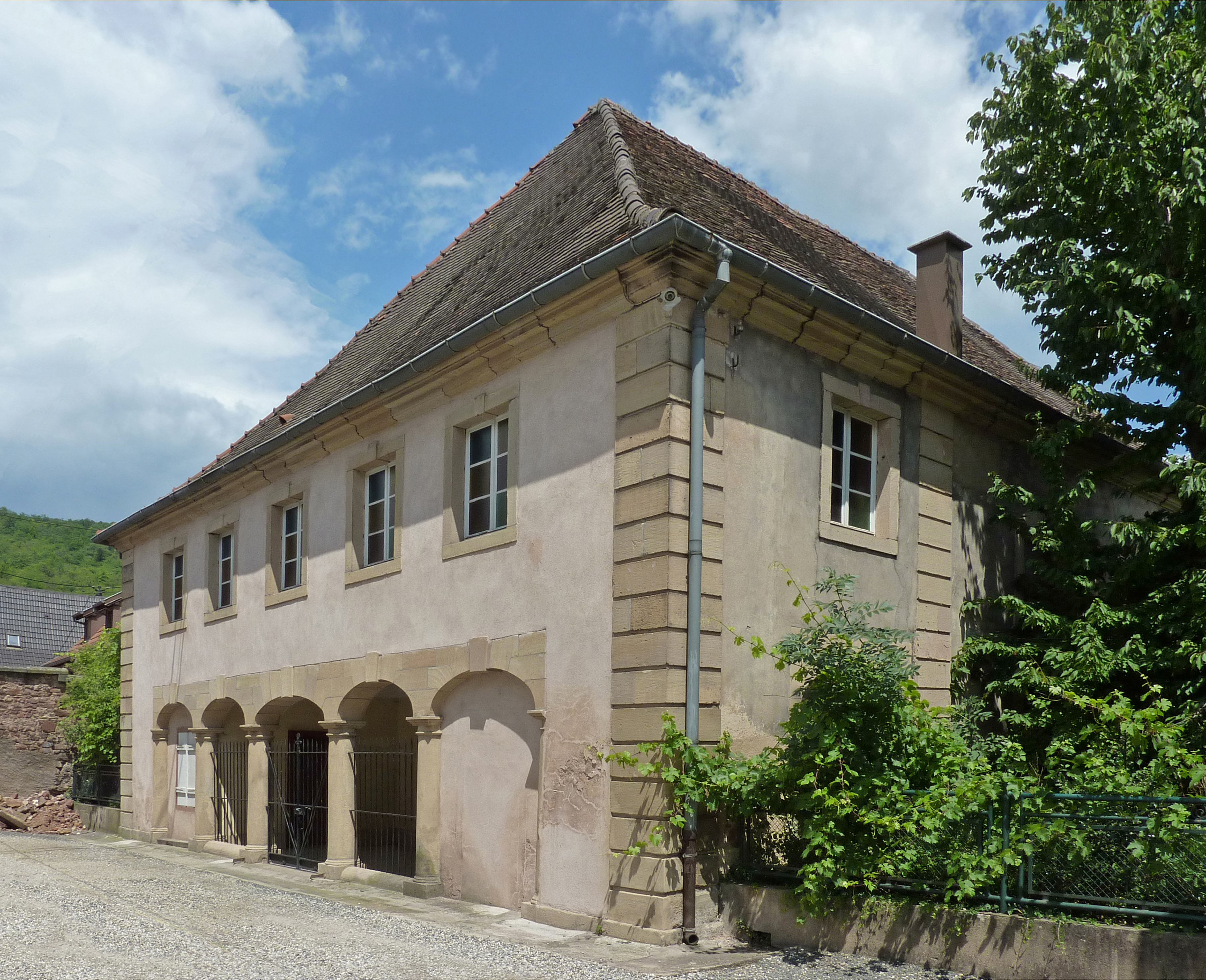 Synagogue de Mutzig construite en 1787, la plus ancienne d'Alsace